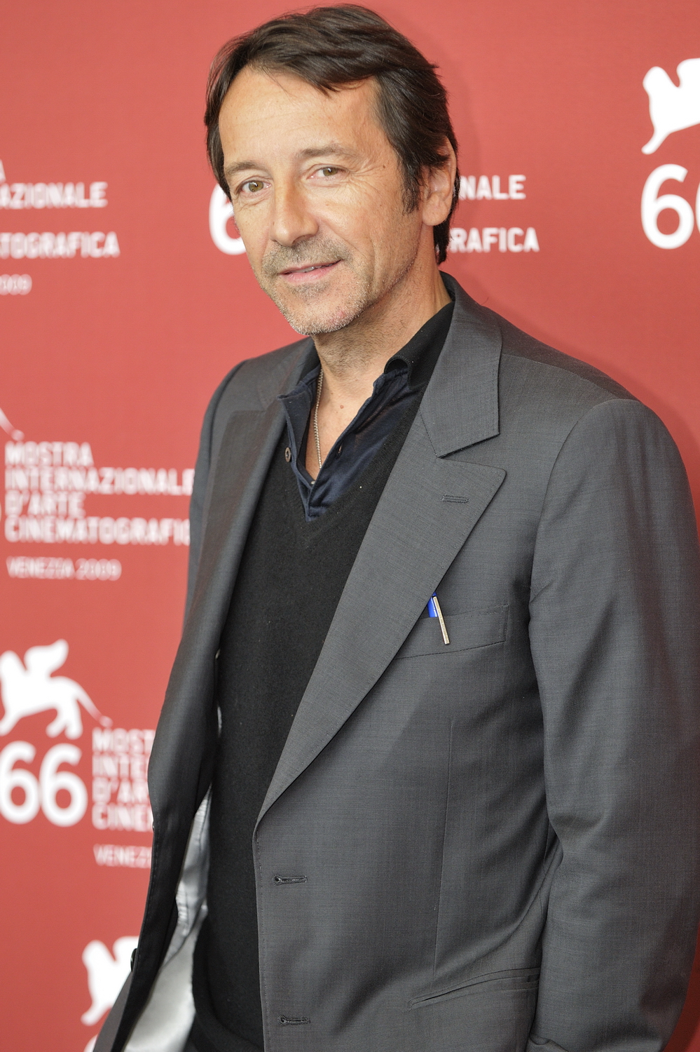 66ème Festival du Cinéma de Venise (Mostra), 4ème jour (05/09/2009). Photocall avec Jean-Hugues Anglade pour le film : Persécution.